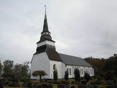 Hasslövs kyrka i södra Halland